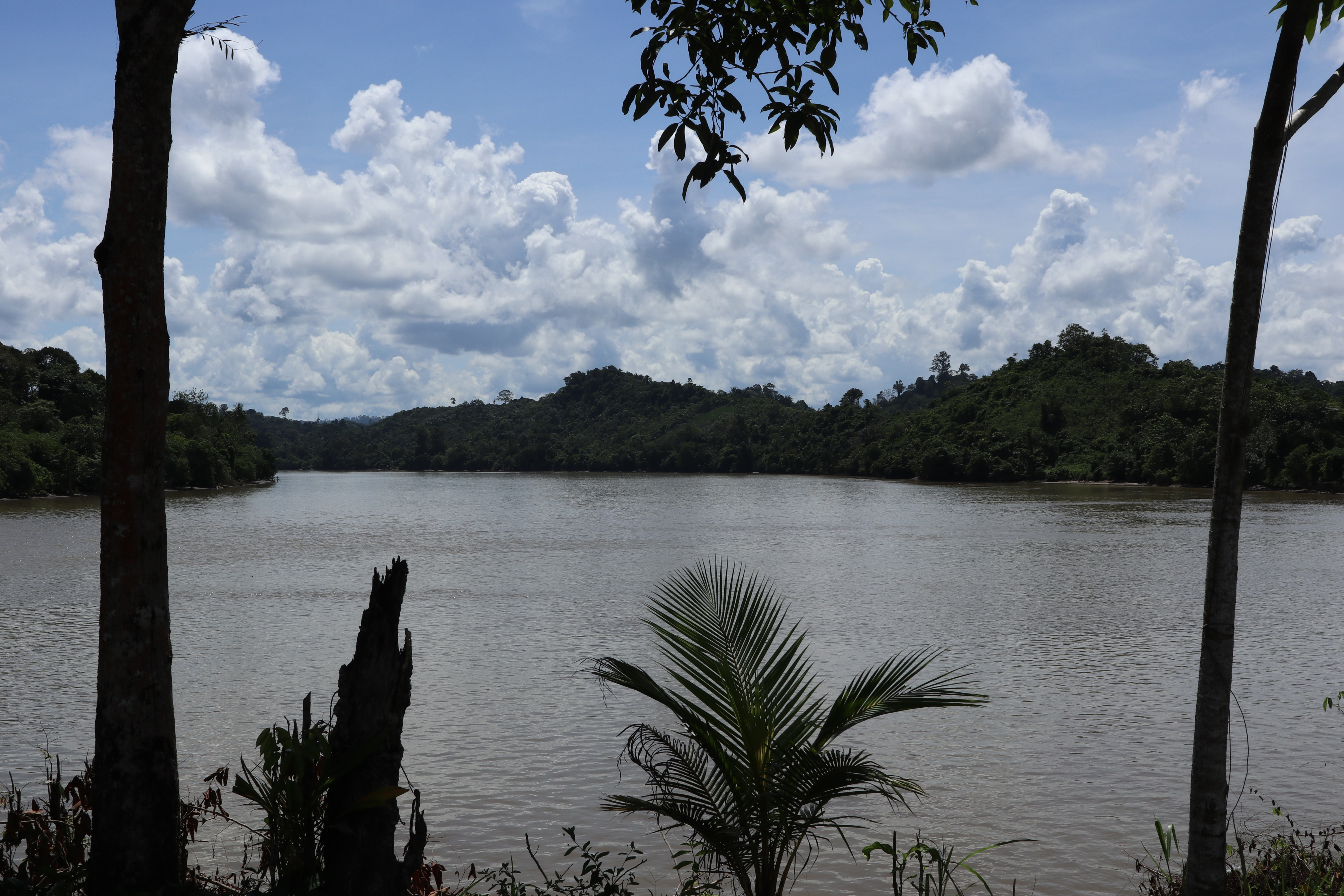 Sungai Kayan yang berhulu di pegunungan kawasan Taman Nasional Kayan Mentarang dan bermuara di Laut Sulawesi.